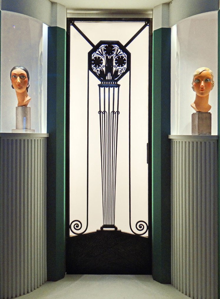 Deux têtes de mannequin Têtes de mannequin de l'Entreprise Siégel Cérolaque vers 1930 Porte d'entrée de la boutique Siégel à l'Exposition internationale des arts décoratifs et industriels modernes de Paris en 1925 sur le Pont Alexandre-III fer forgé et verre 1925 Musée des années 30 Boulogne-Billancourt